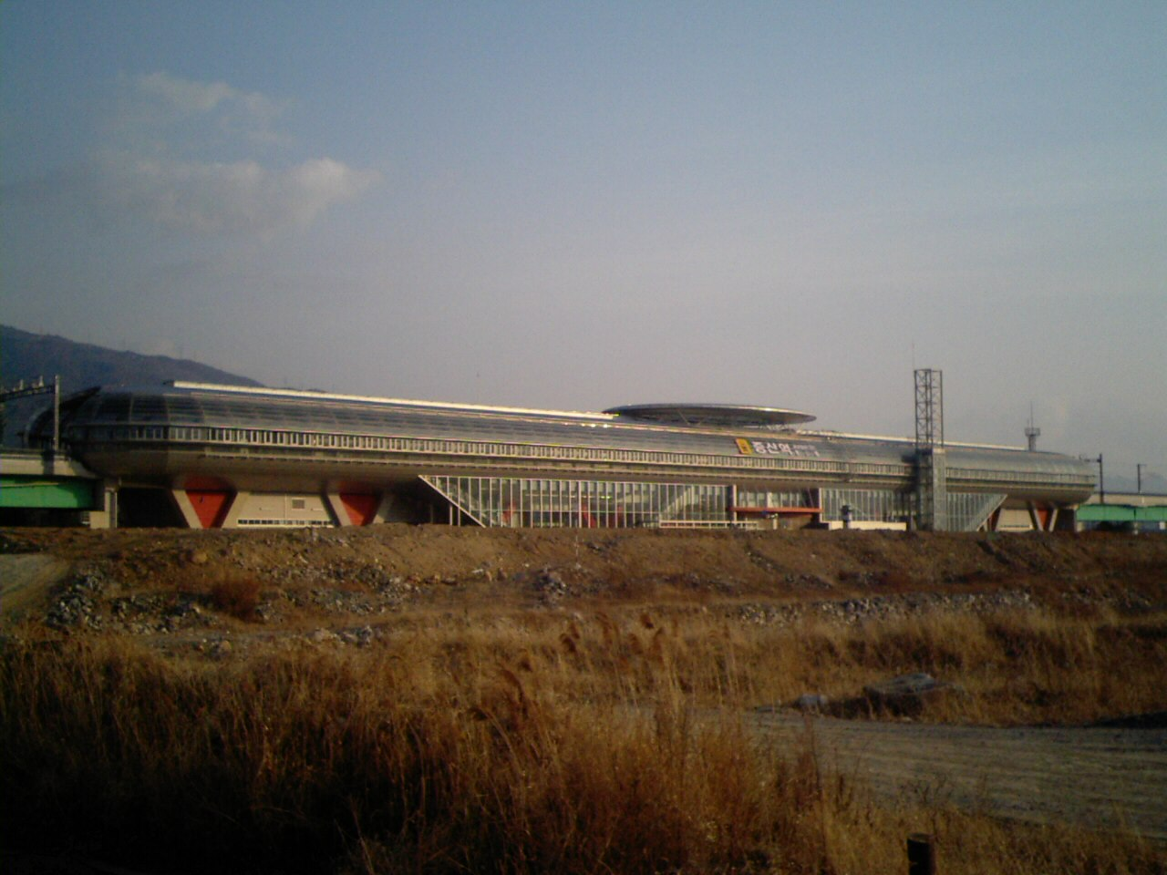 부산지하철 2호선 증산역